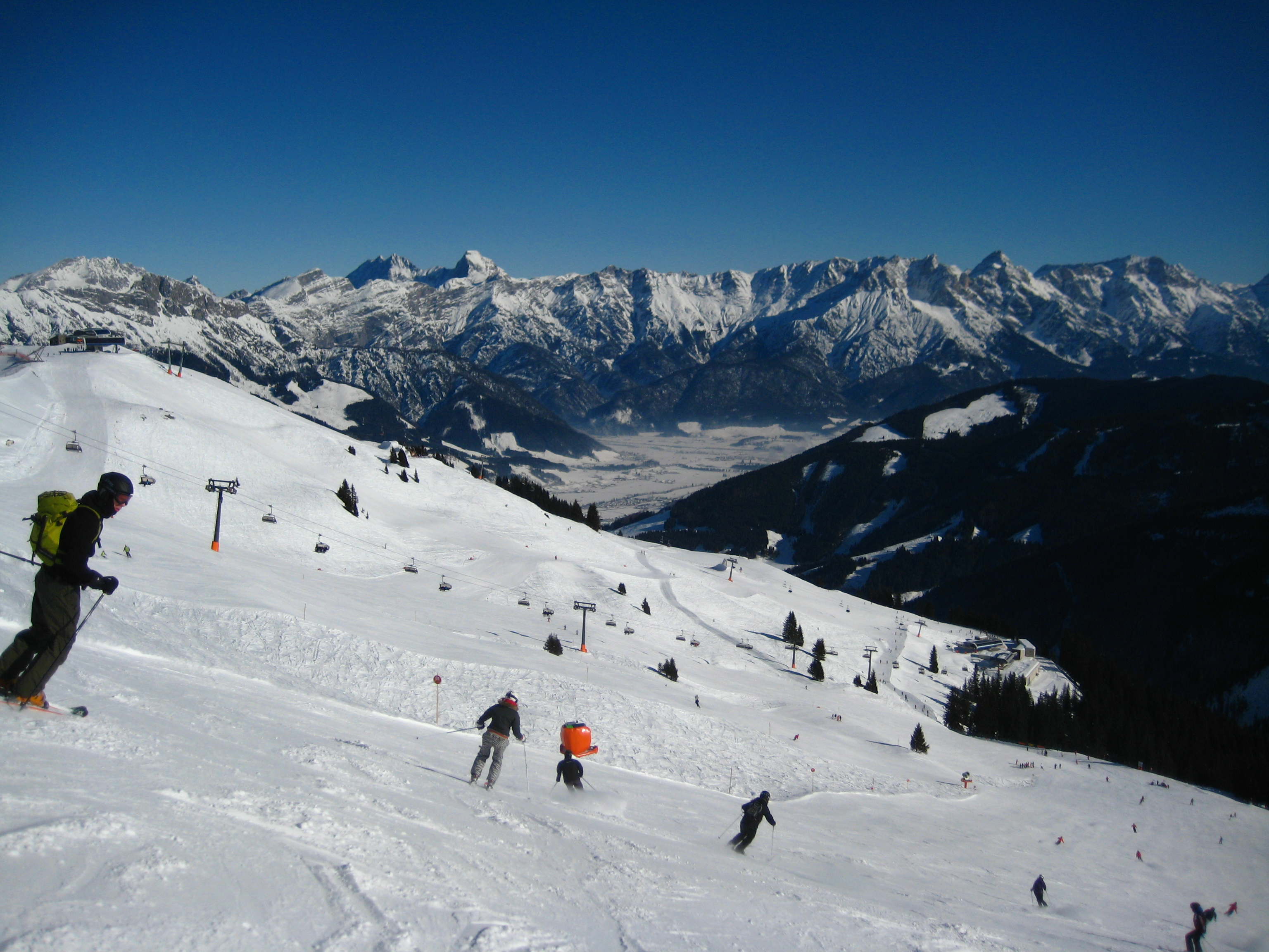 Im oberen Pistenbereich es Schigebiets von Leogang.